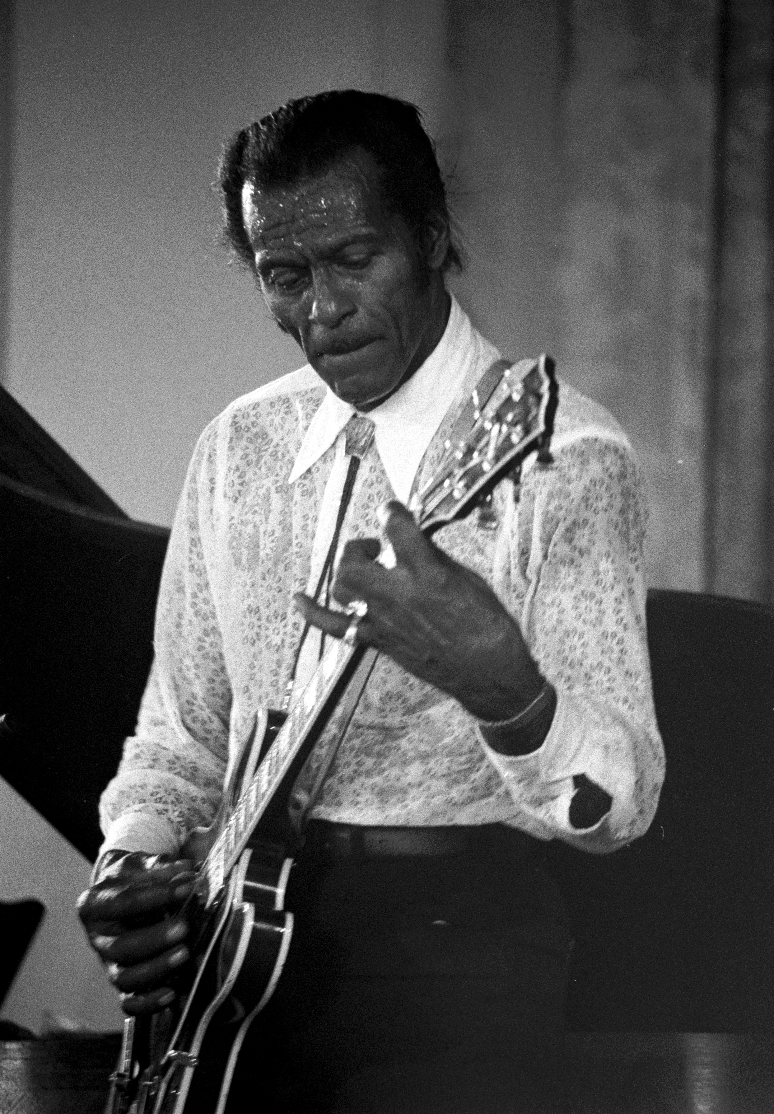 Le chanteur américain Chuck Berry en concert à Deauville (Normandie, France) en 1987.